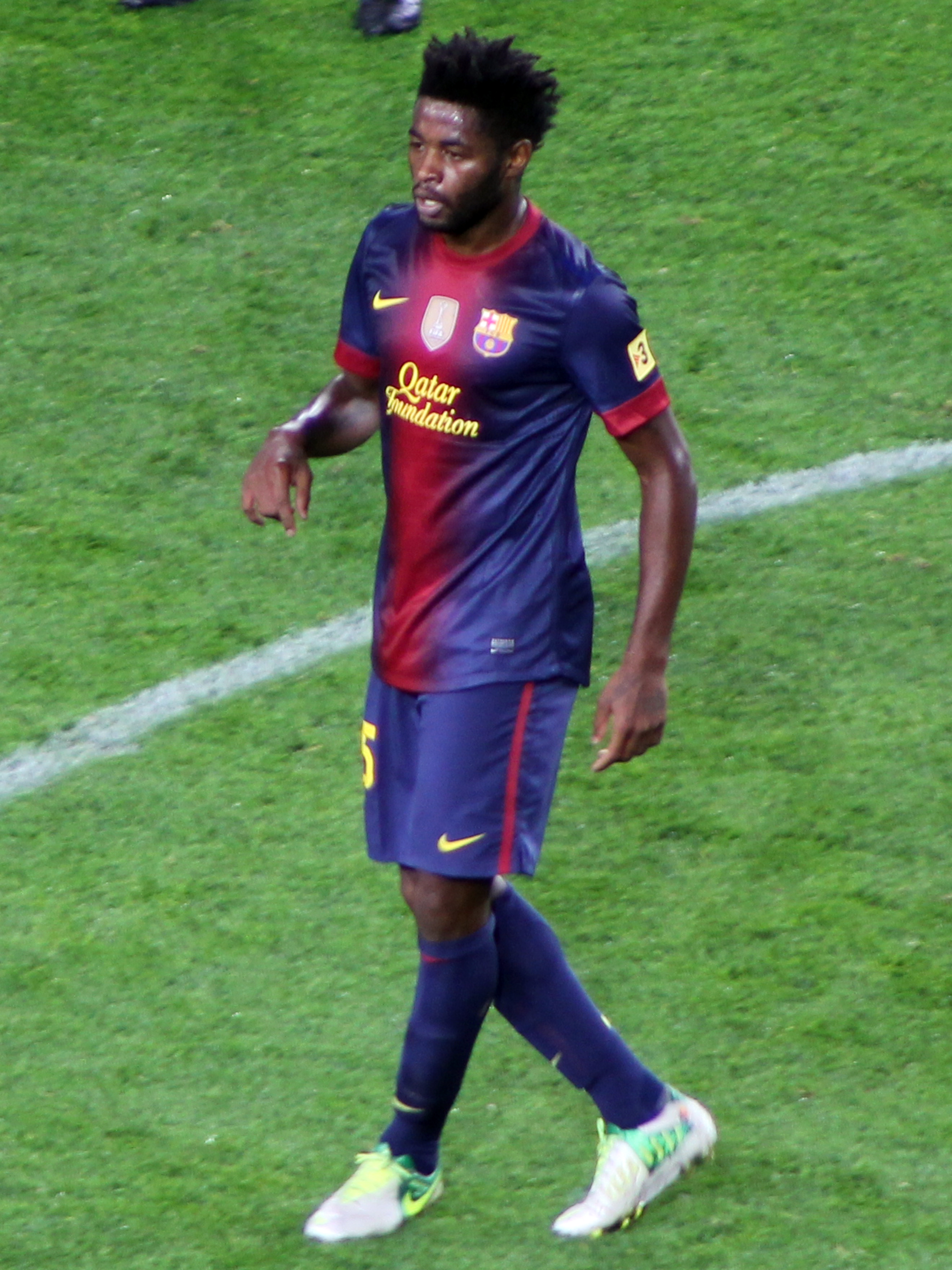 Alex Song con la camiseta del FC Barcelona, en un partido de dieciseisavos de Copa del Rey contra el Alavés, en el Camp Nou.